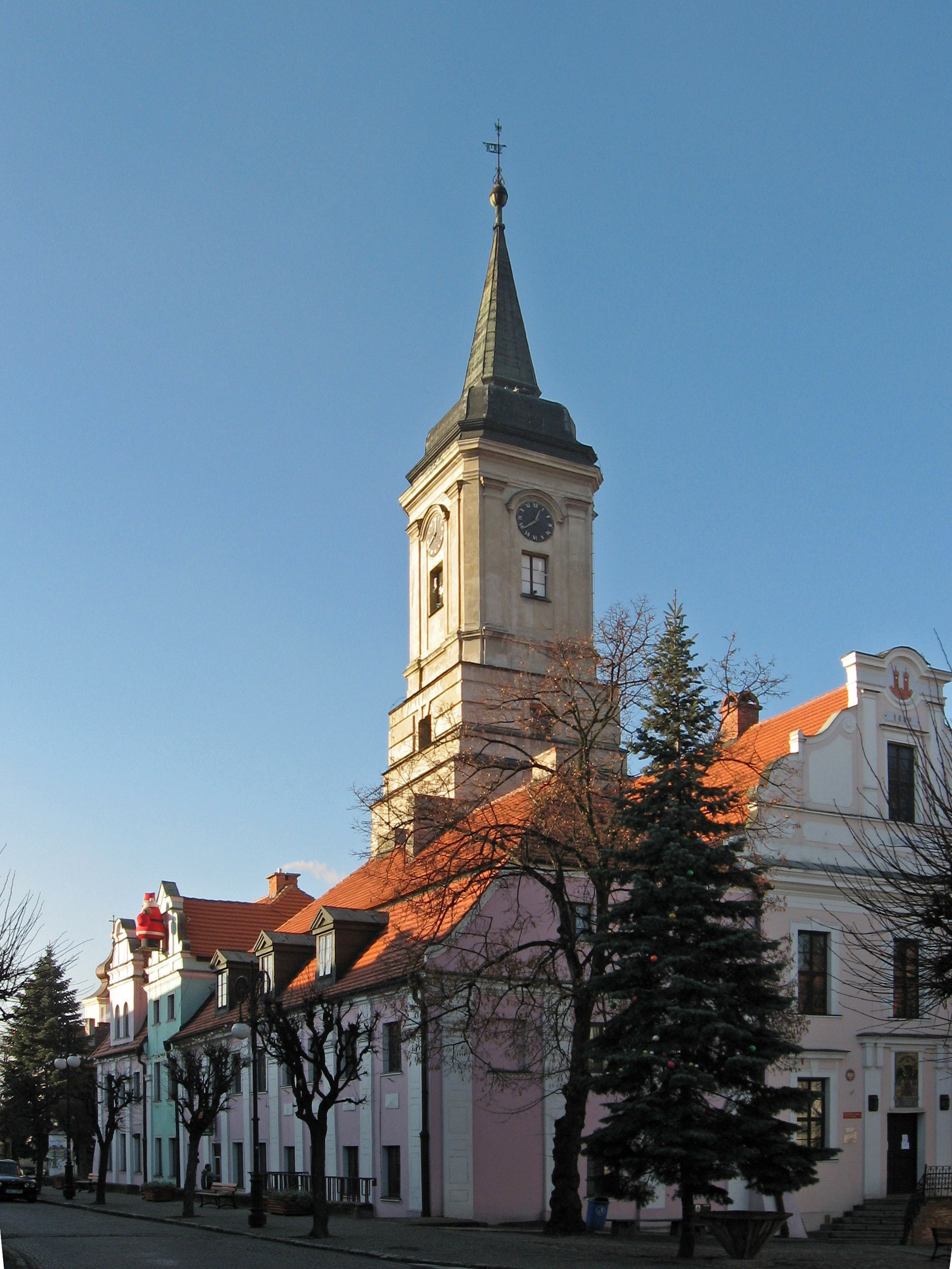 Ratusz w Byczynie